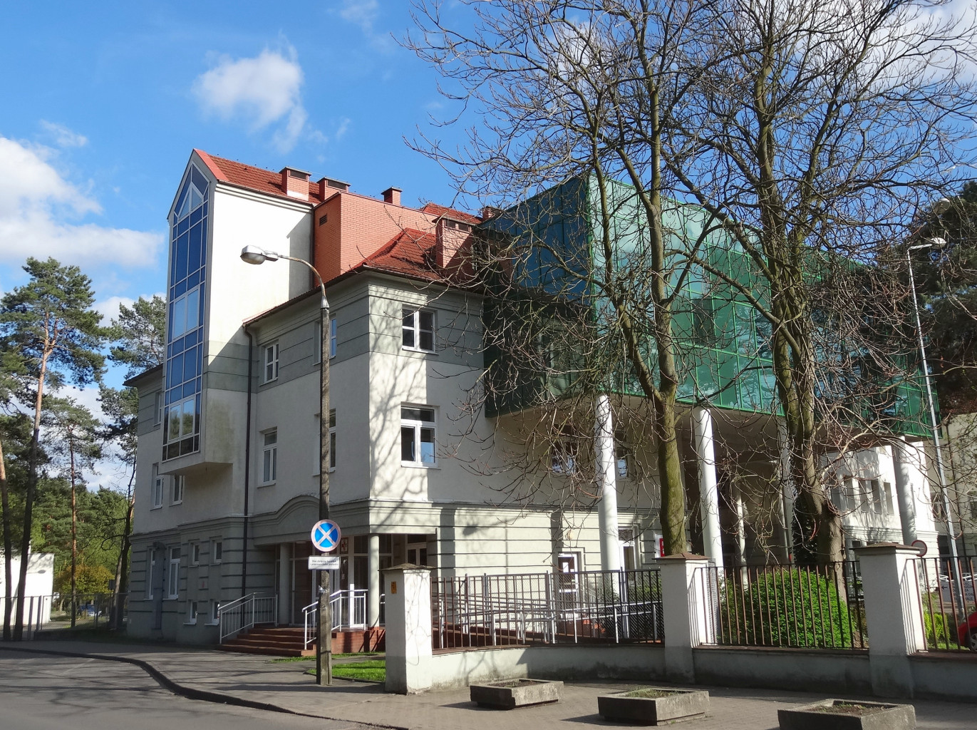 Wielospecjalistyczny Szpital Miejski im. dr. Emila Warmińskiego w Bydgoszczy przy ul. Szpitalnej 19